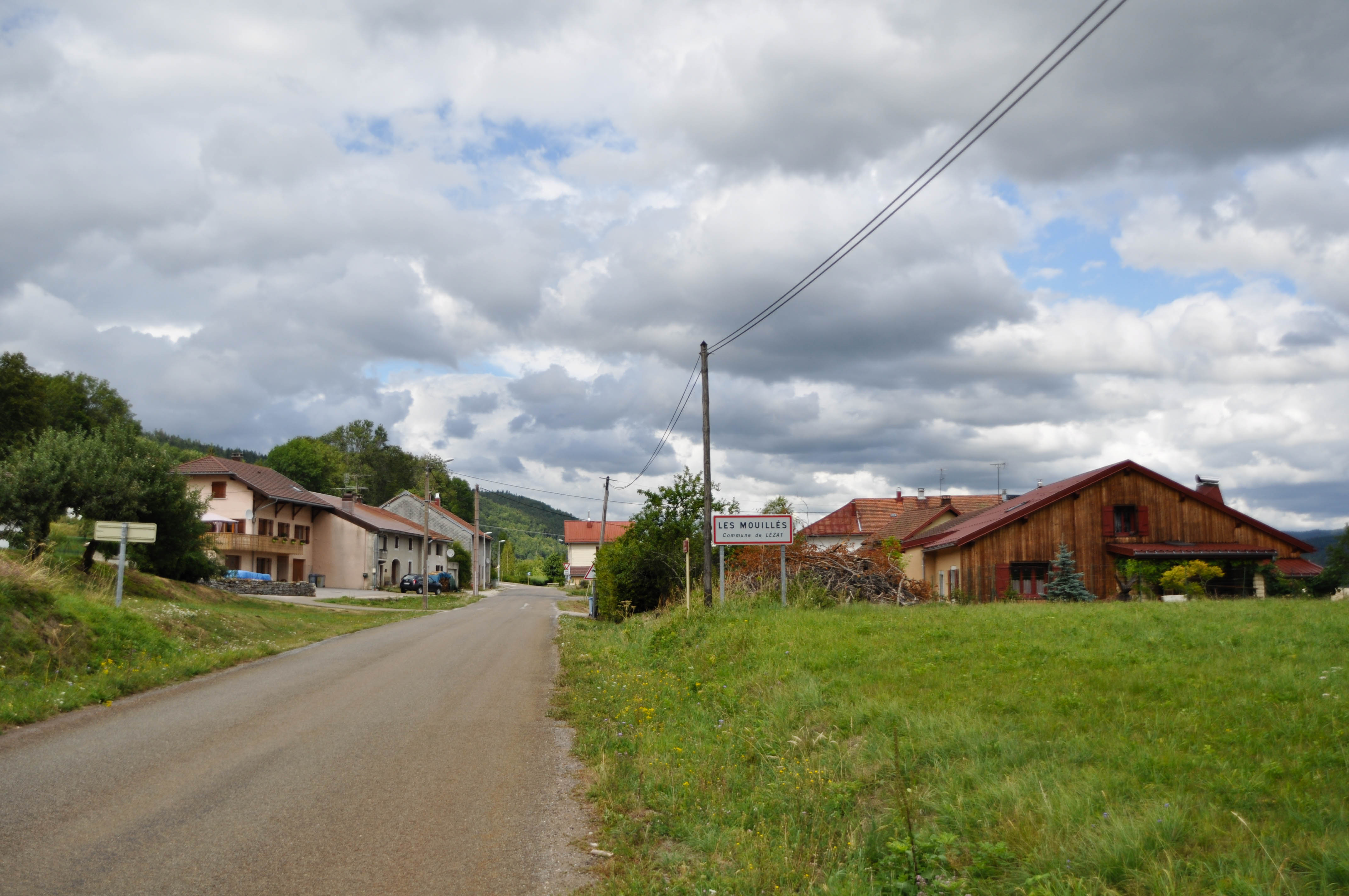 Entrée de village Les Mouillés, commune de Lézat, Jura.